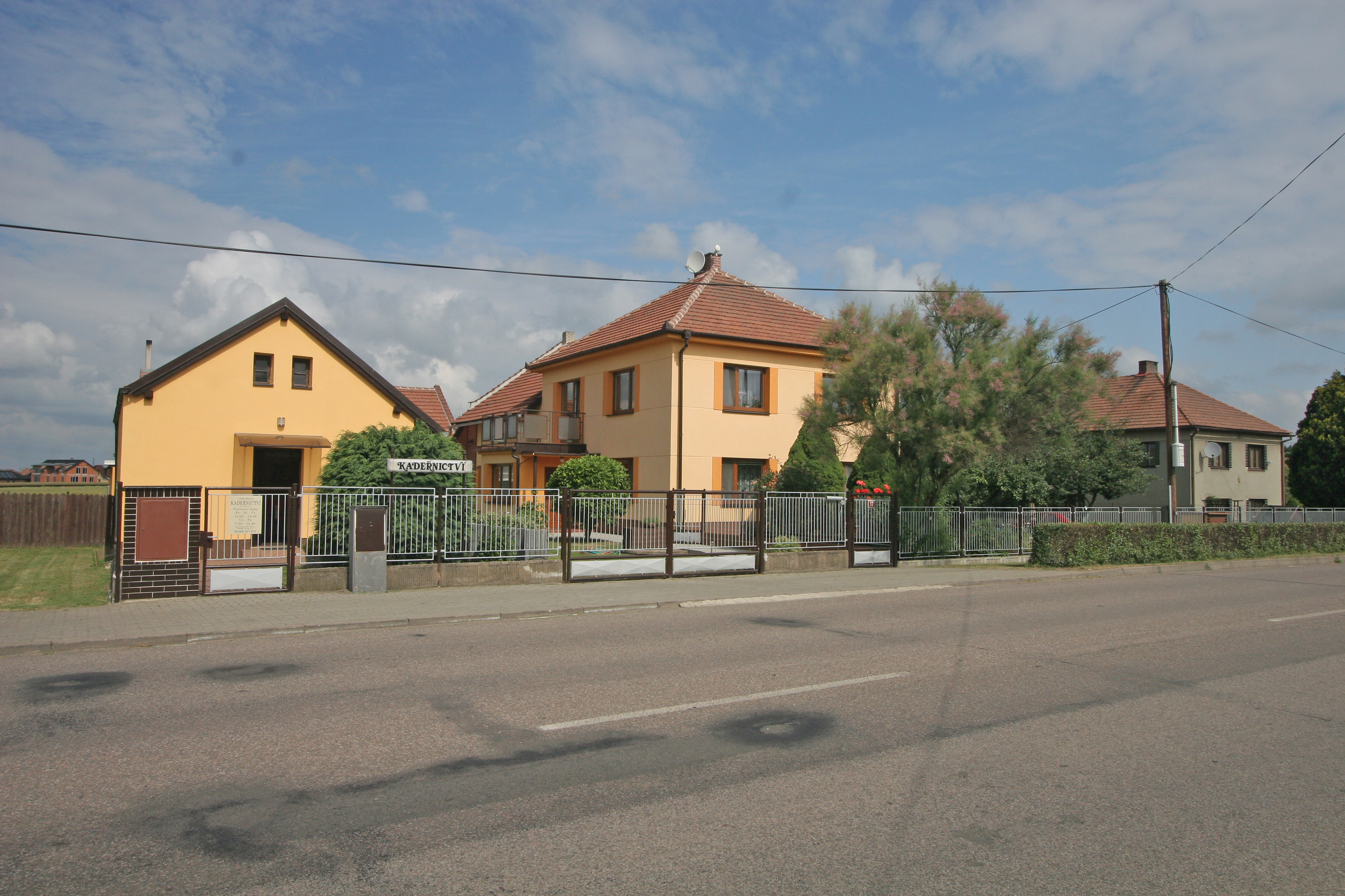 Hradiště na Písku čp. 17